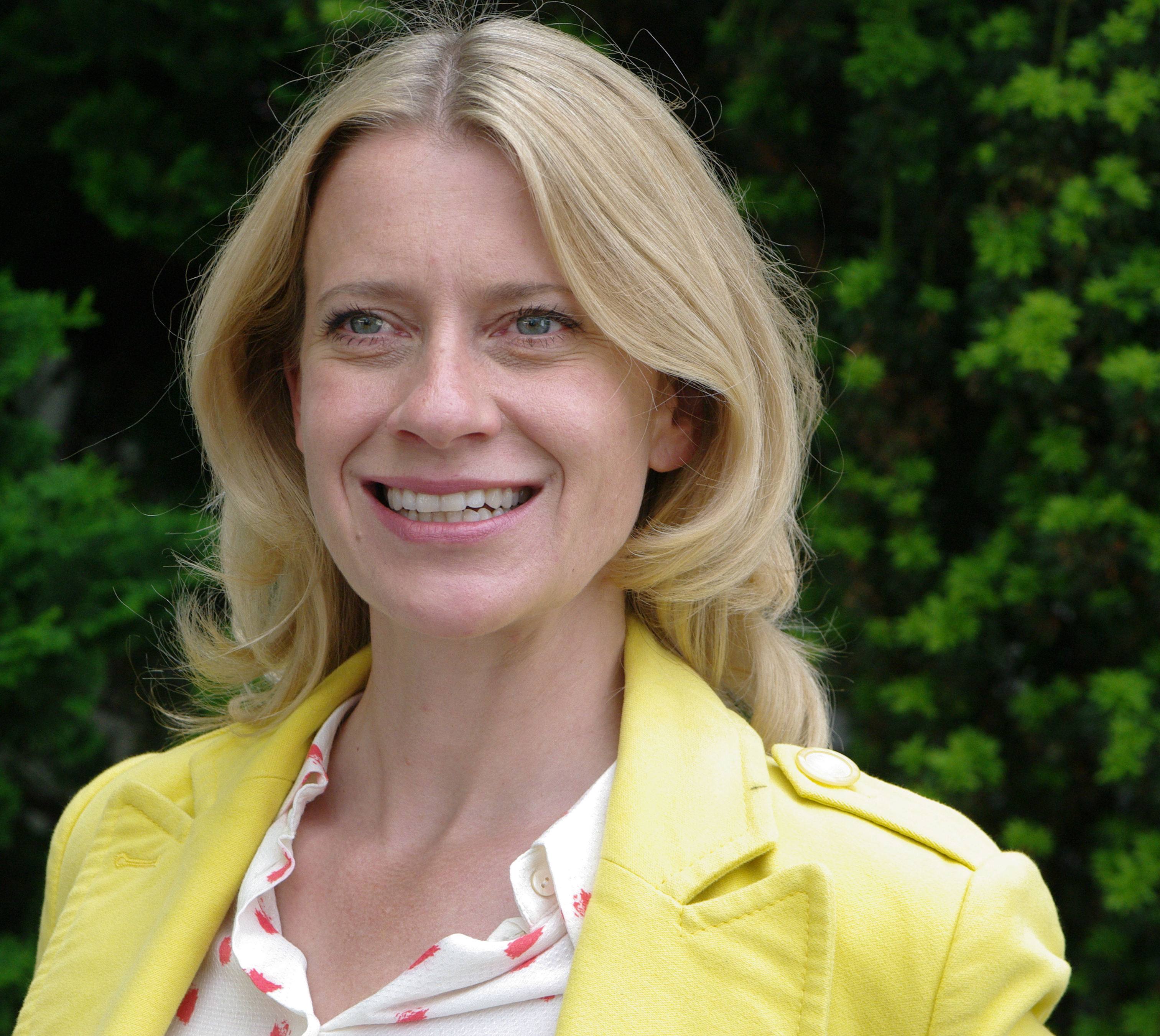 Settermin ARD Serie "Mord mit Aussicht" am 13-Juni 2014 in Neunkirchen-Seelscheid